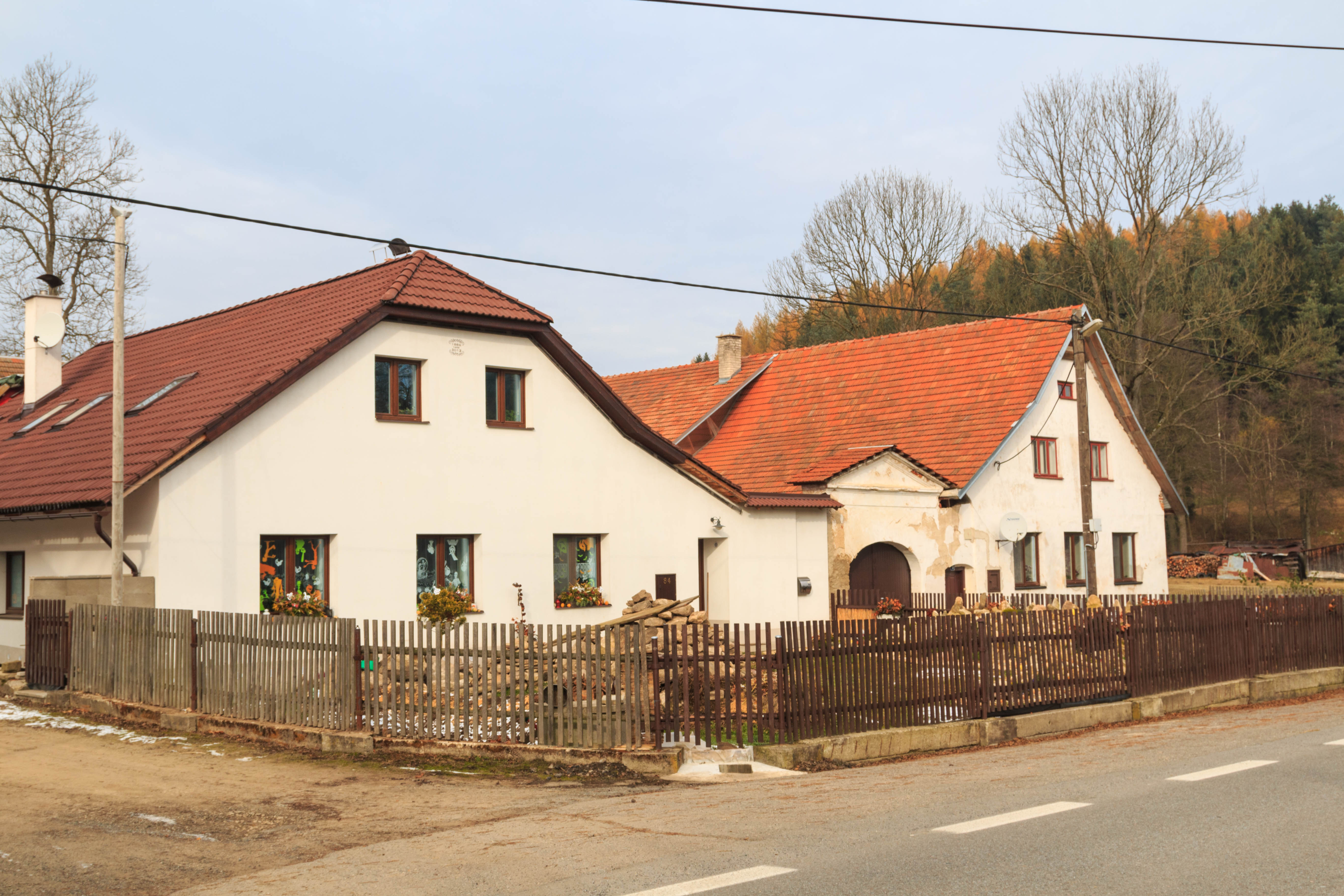 Kuklík - čp. 84